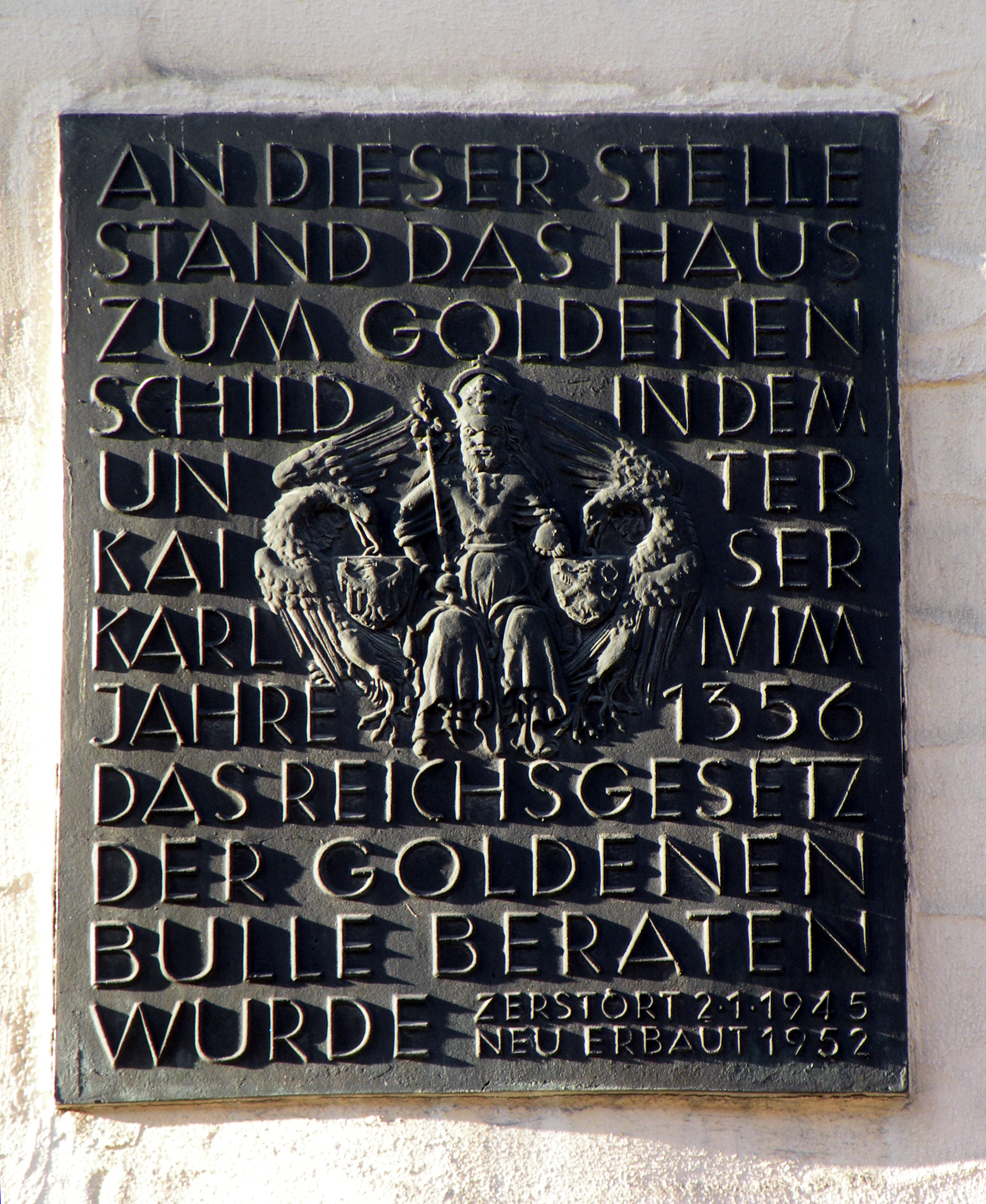 Памятная доска на "доме Золотой Буллы".Нюрнберг